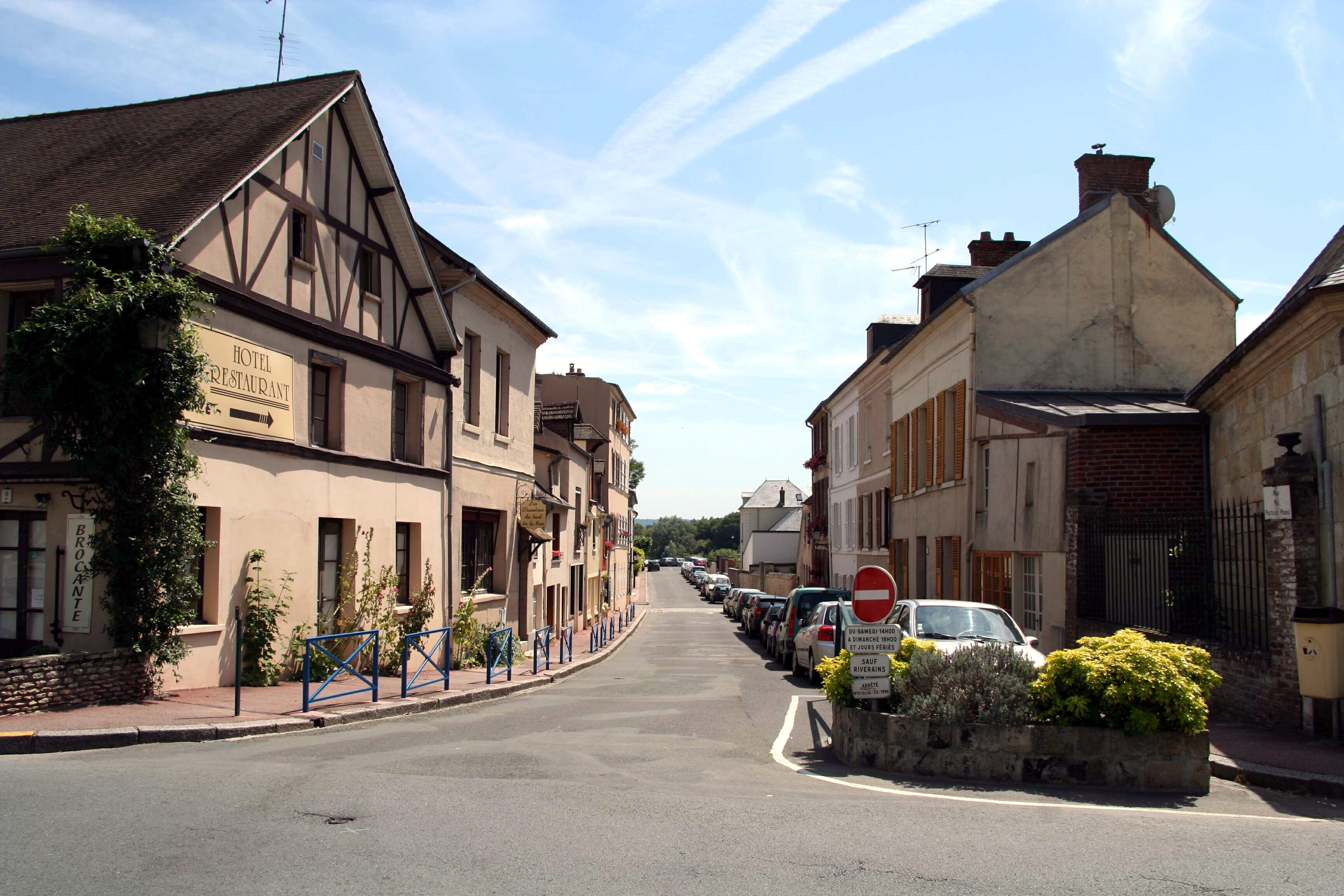 Rue (en direction de la Seine), la Roche-Guyon, Val-d'Oise (France)